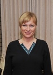 マカ・チチュア・グルジア大統領夫人